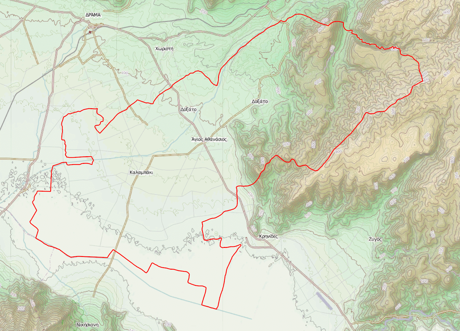 Τοπογραφικός χάρτης του Δήμου Δοξάτου (2011)